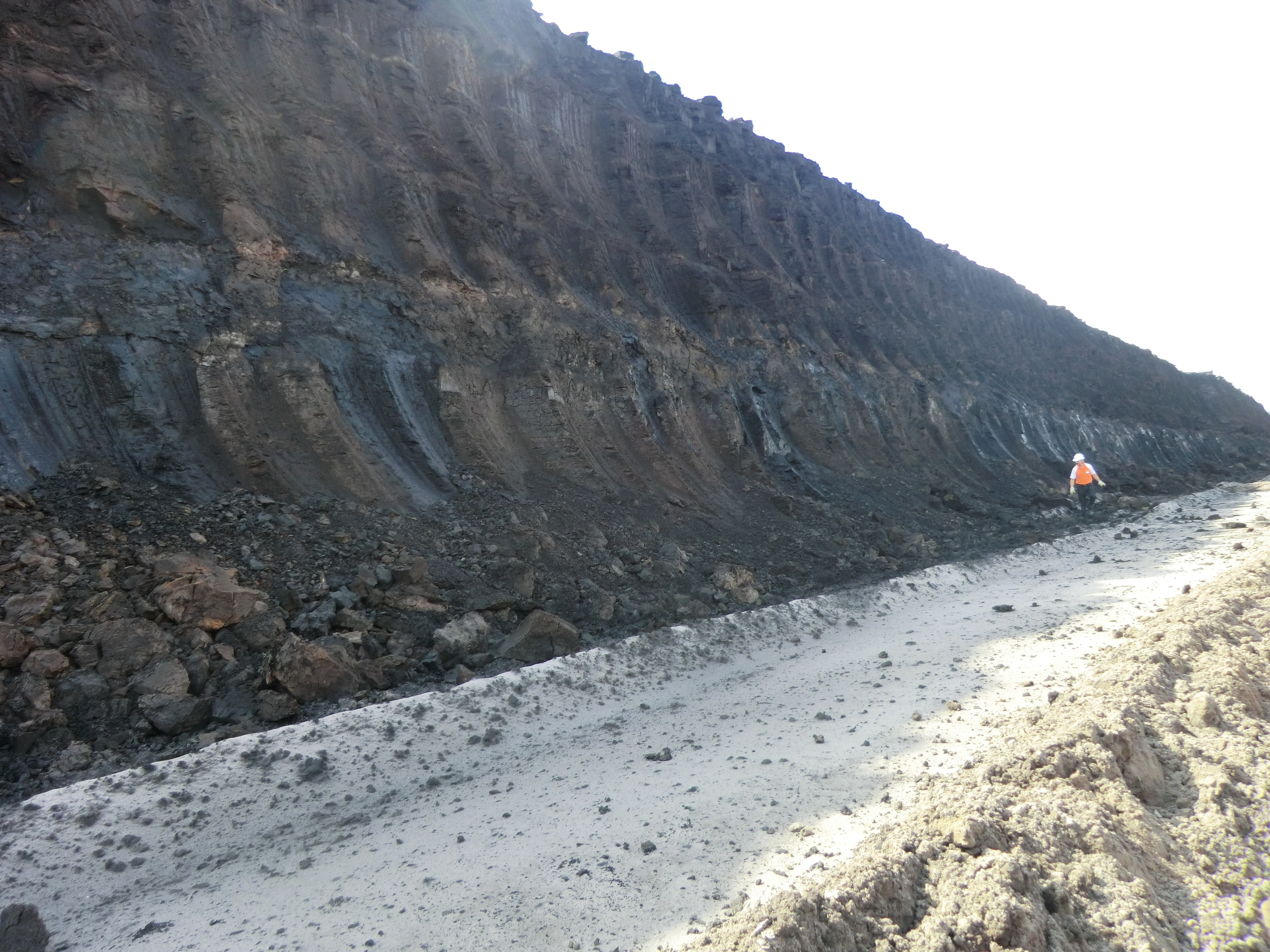 Braunkohle Abbruchkante Tagebau Welzow Süd